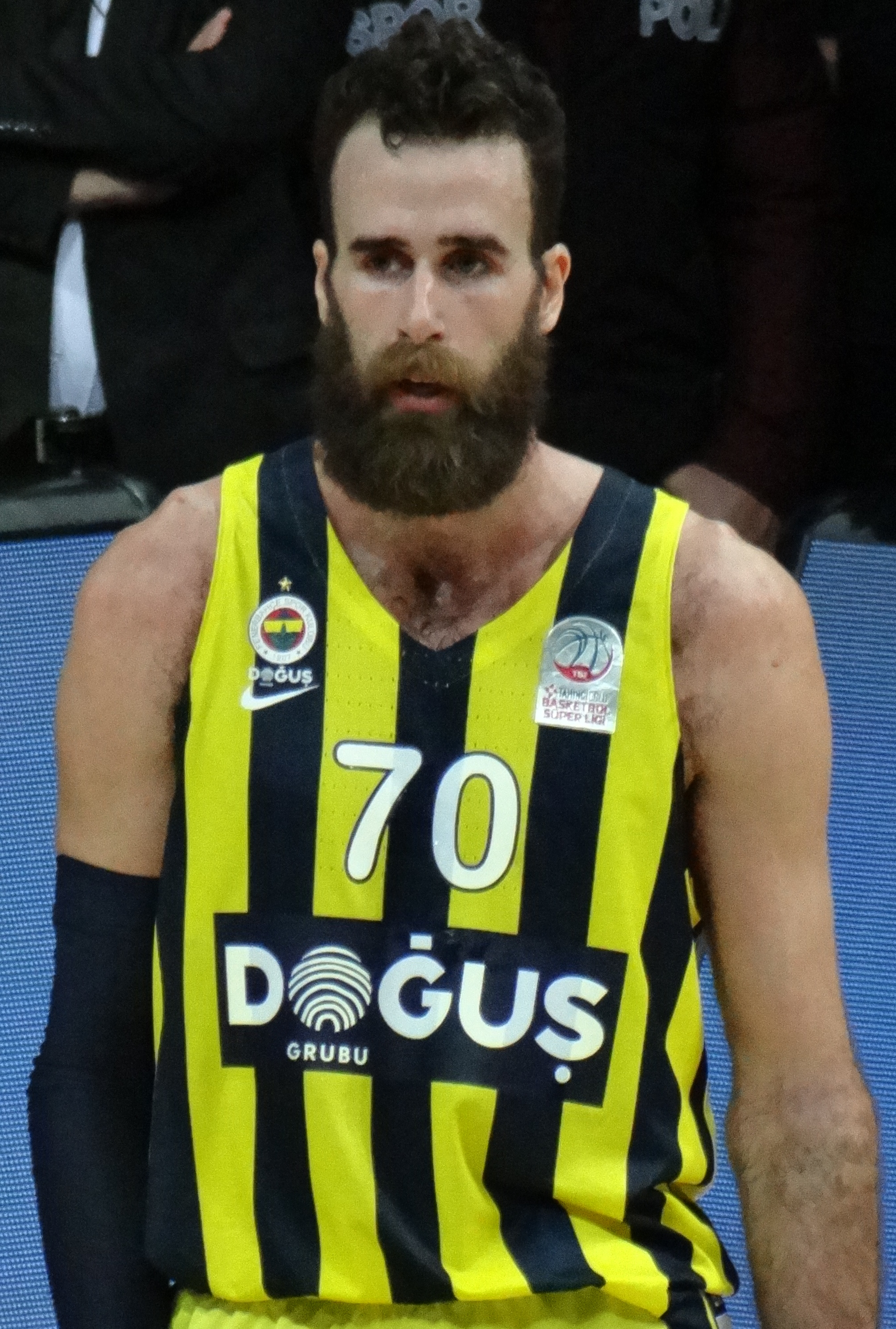 Luigi Datome 70 - FB Dogus 20180107.jpg